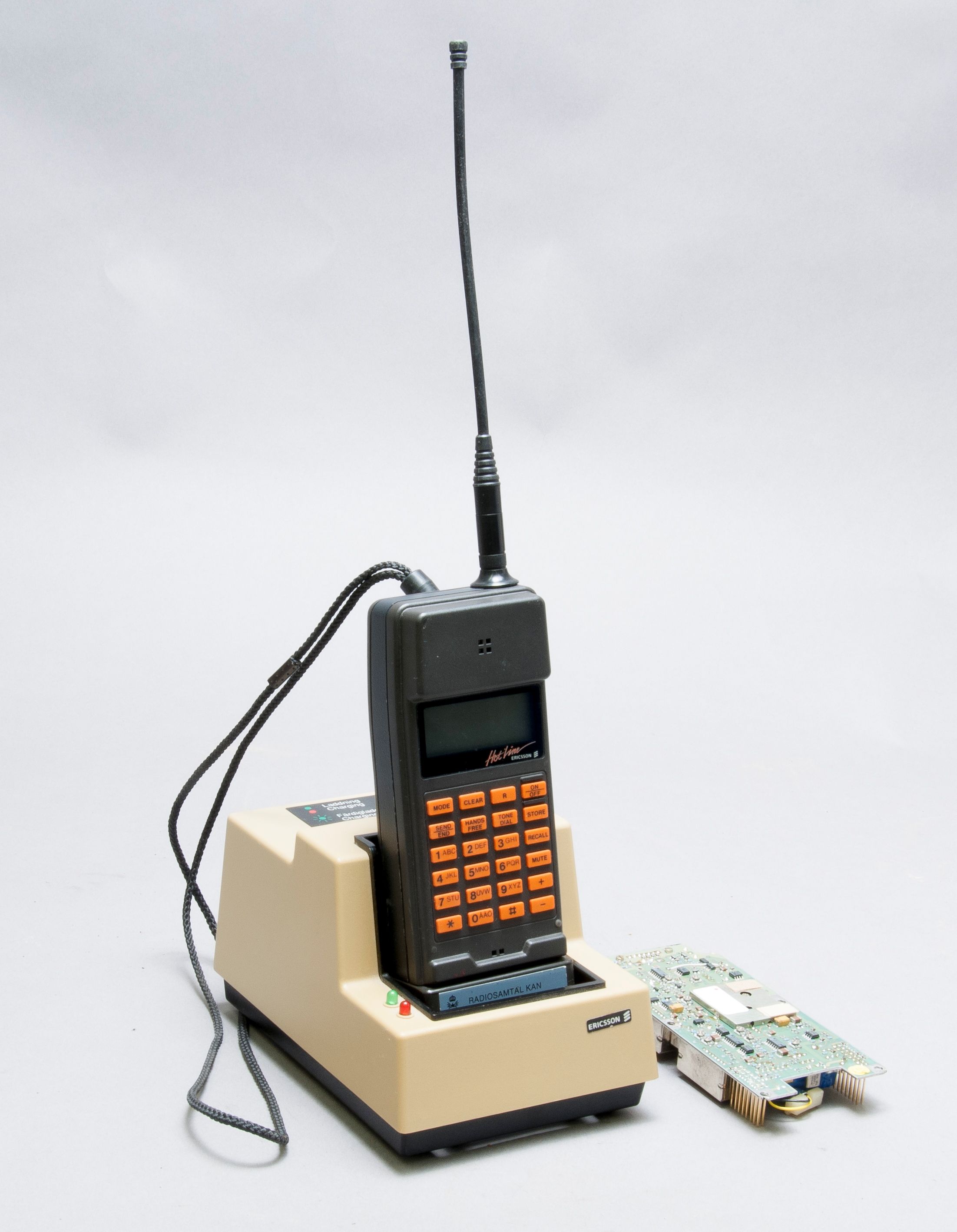 Första handhållna ficktelefonen från Ericsson, för NMT 900-systemet. Vikt: 0,3 + 0,2 kg. Tillbehör: Tillhörande batteri TeM 51475 och laddare TeM 51476.